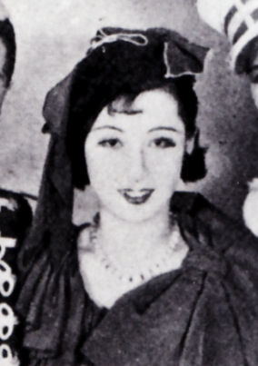 江戸川蘭子（松竹歌劇）